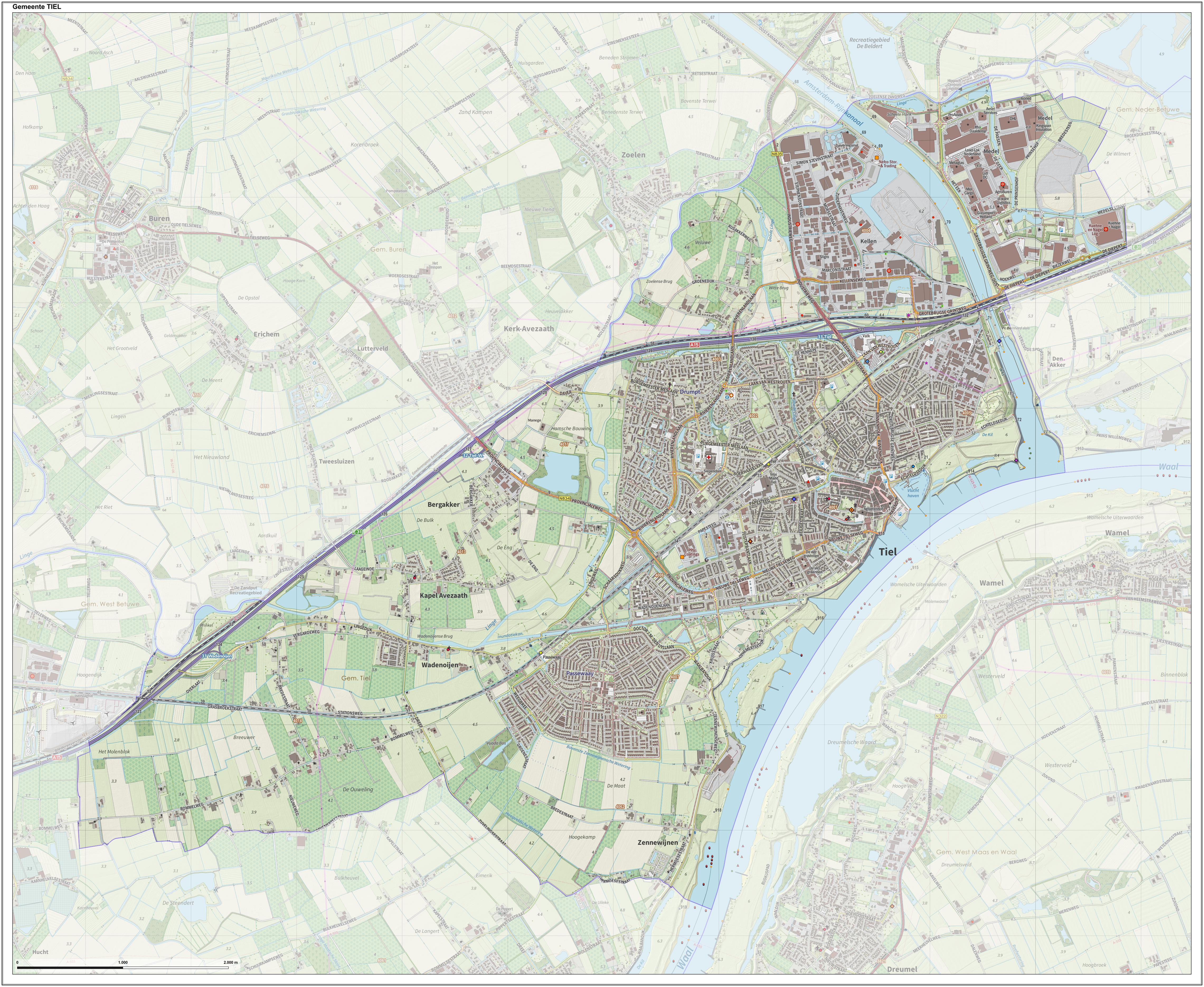 Topografische gemeentekaart. Resolutie: 400 pixels/km. Kaartbeeld samengesteld uit de open geodata van de Top10NL en Top25namen (Kadaster), Creative Commons-BY licentie. Gebouwvlakken uit open geodata BAG extract. Wegen uit de OpenStreetMap, OpenStreetMap community. Reliëfschaduw uit de Actuele Hoogtekaart AHN2. Samenstelling en kleurenschema: Jan-Willem van Aalst, met QGIS. Zie ook de Legenda.